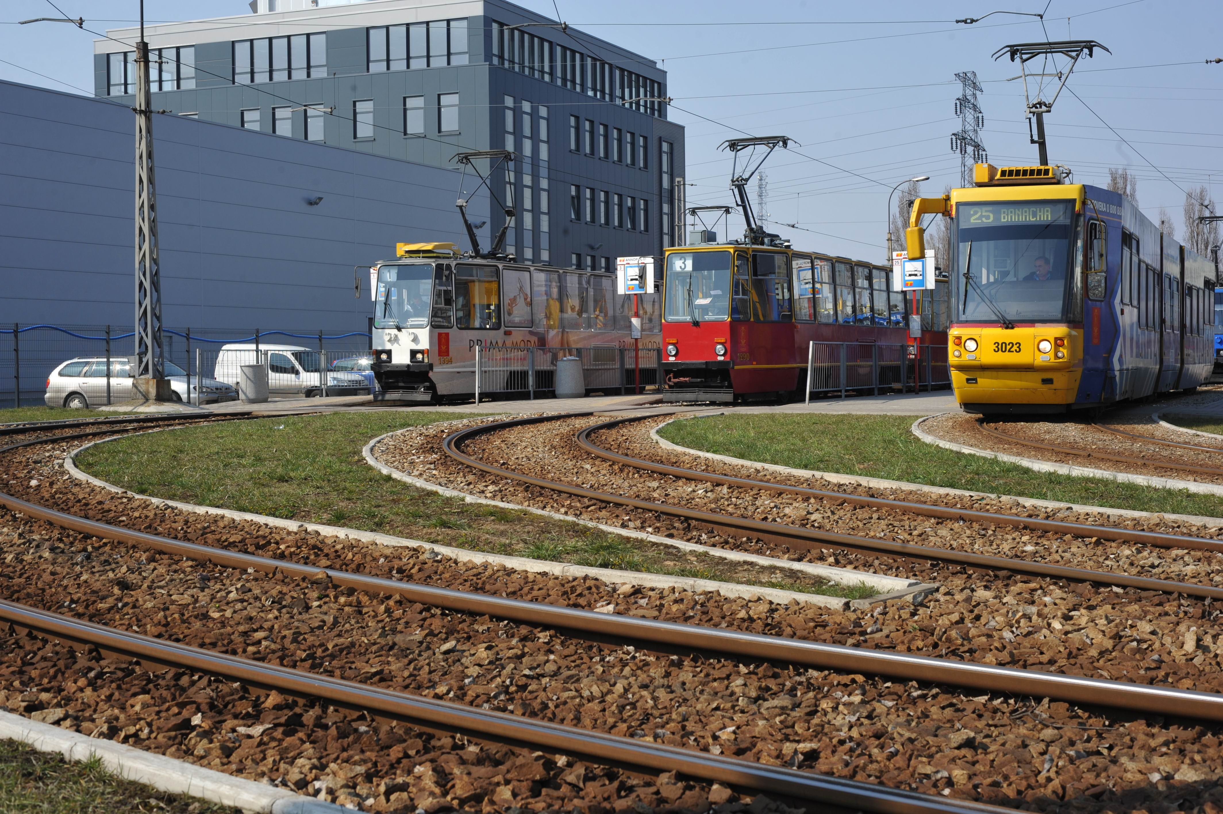 Pętla tramwajowa "Annopol"